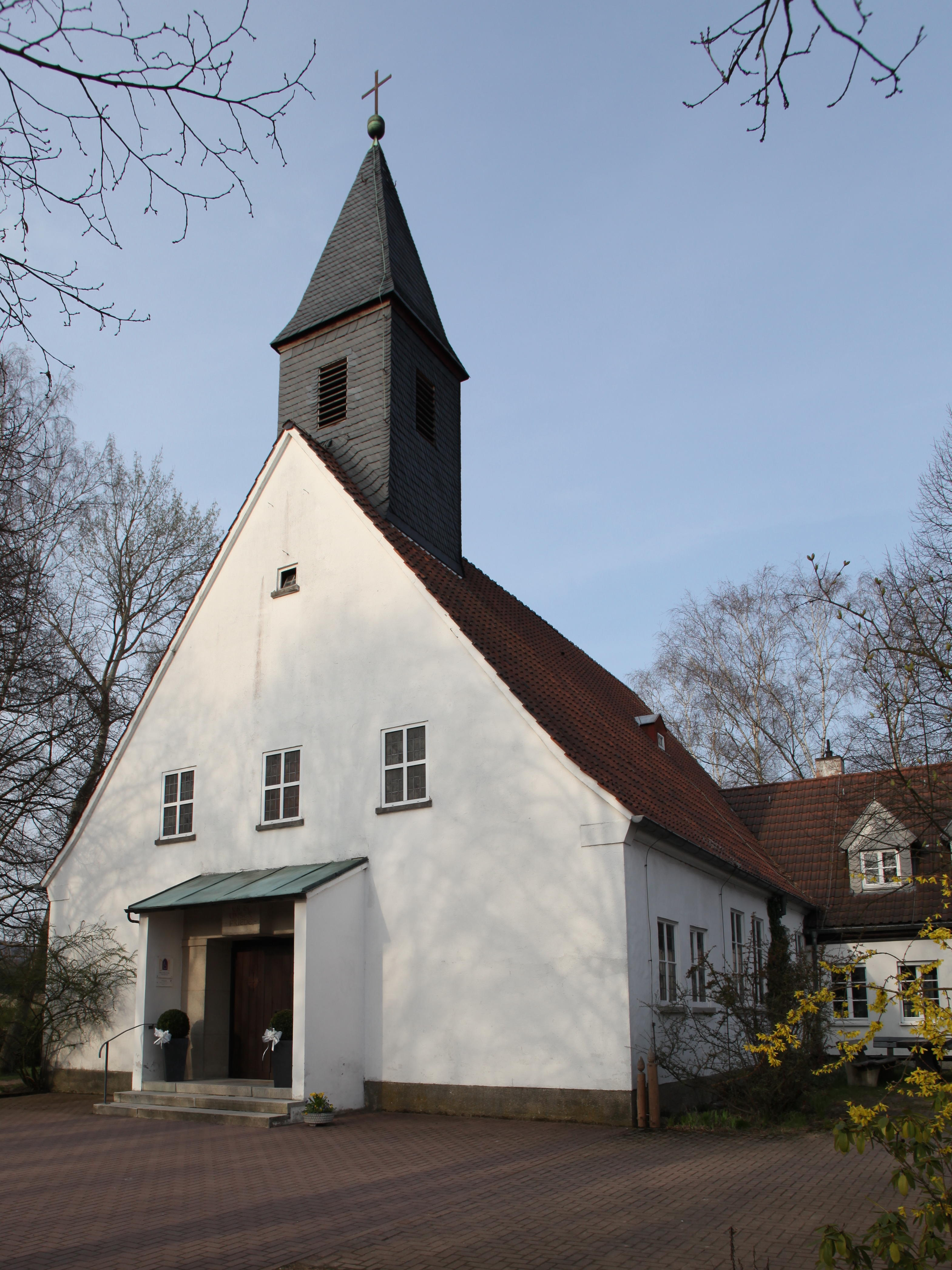 Friedenskirche in Wildenheid (1955, Architekt Reinhard Claaßen), OT von Neustadt bei Coburg